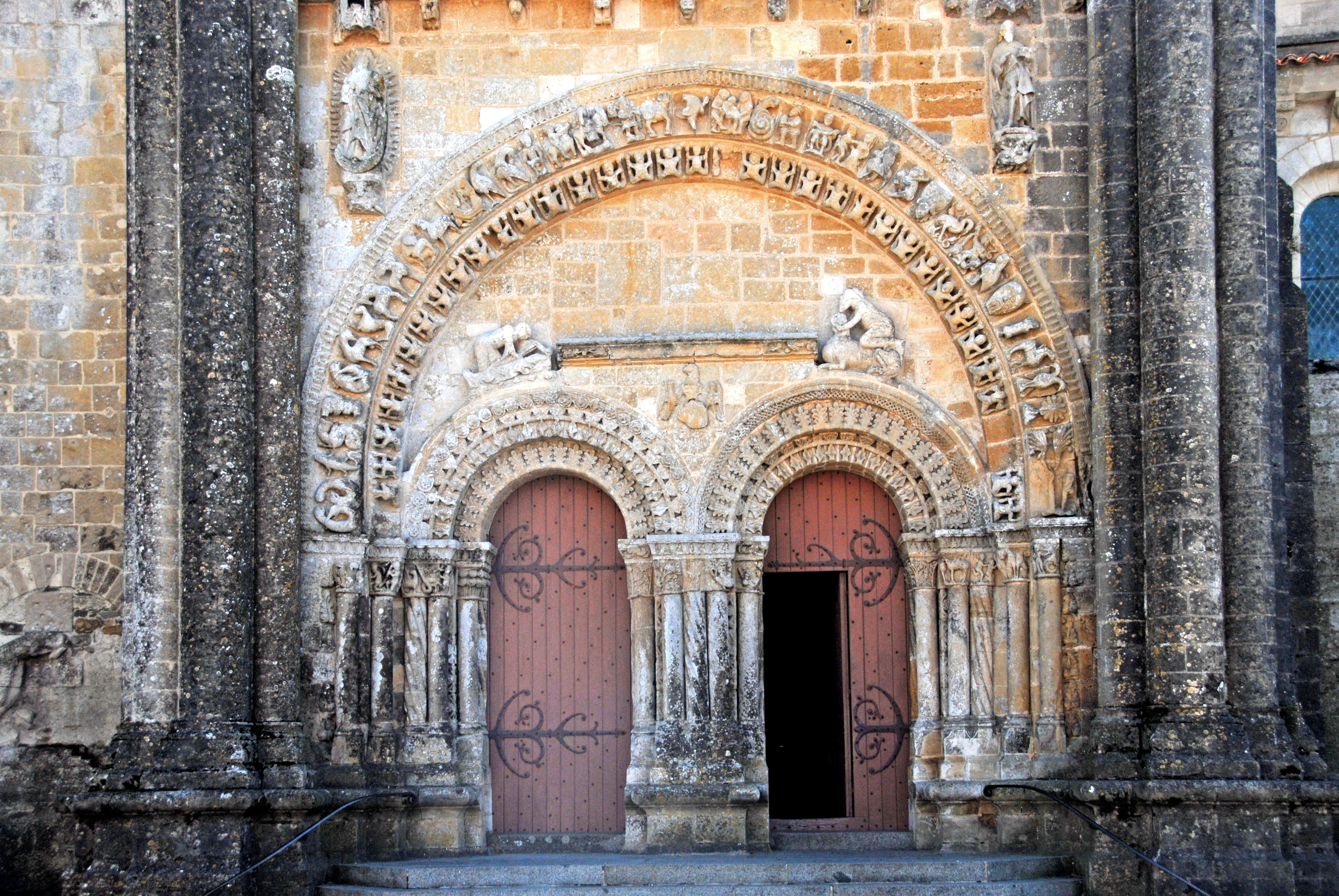 Vouvant, roman. Kirche, Portale unter großer Archivolte